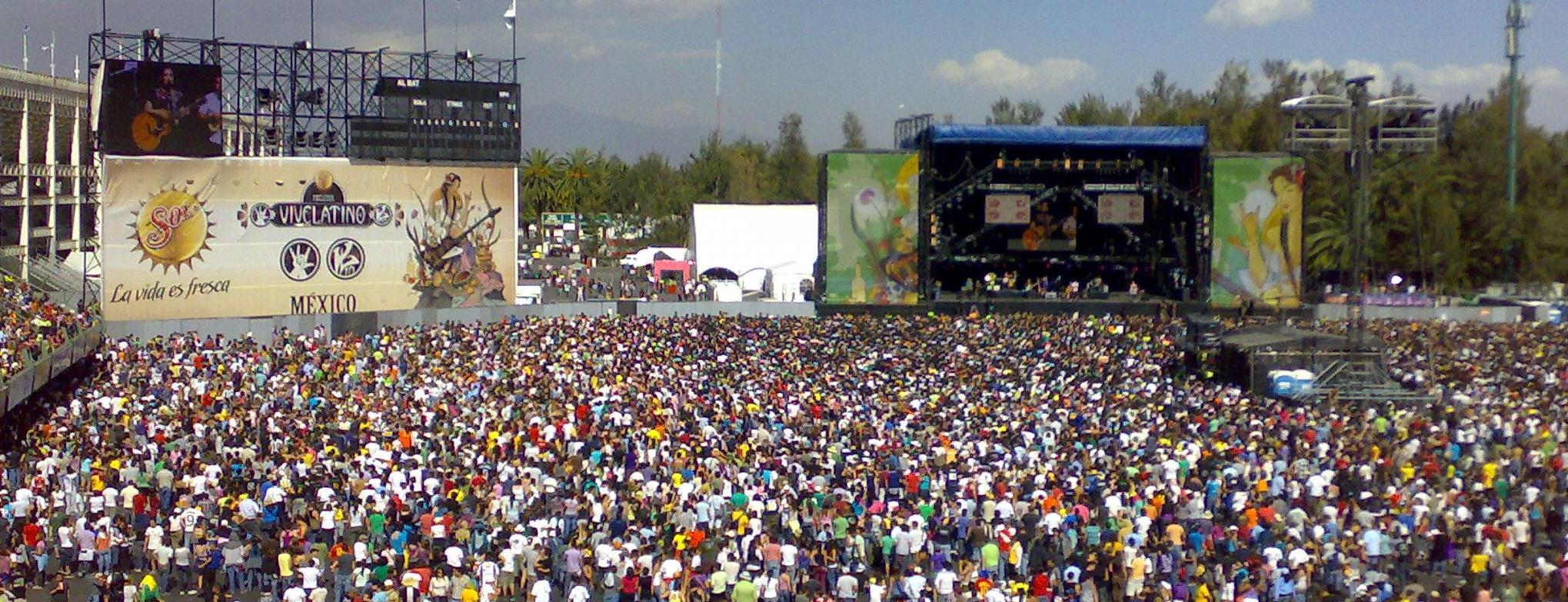 Vista desde las gradas del Festival Iberoamericano de Cultura Musical "Vive Latino" en su edición 2010